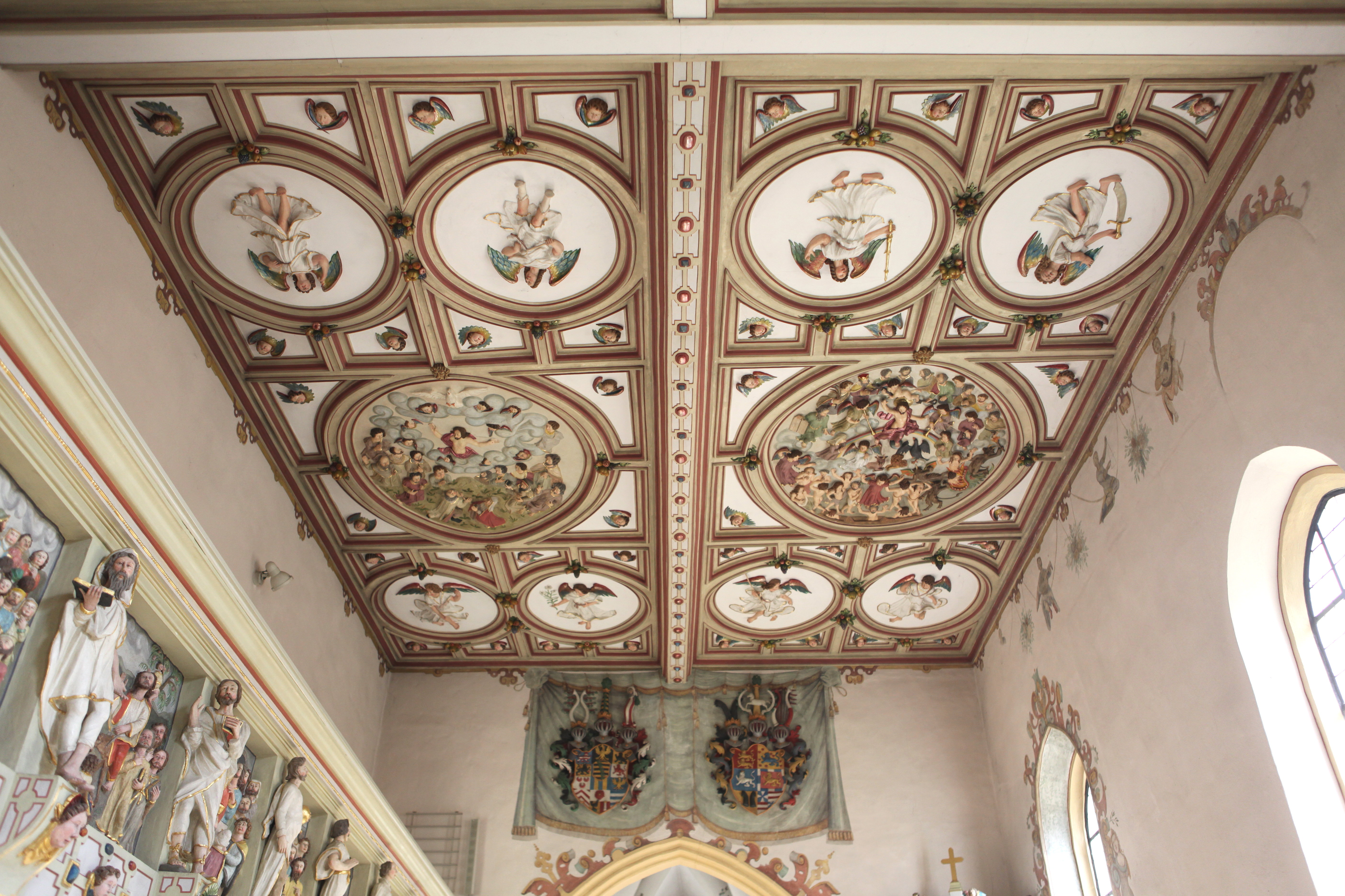 Evangelische Pfarrkirche St. Johannis in Rödental, OT Oeslau, Landkreis Coburg